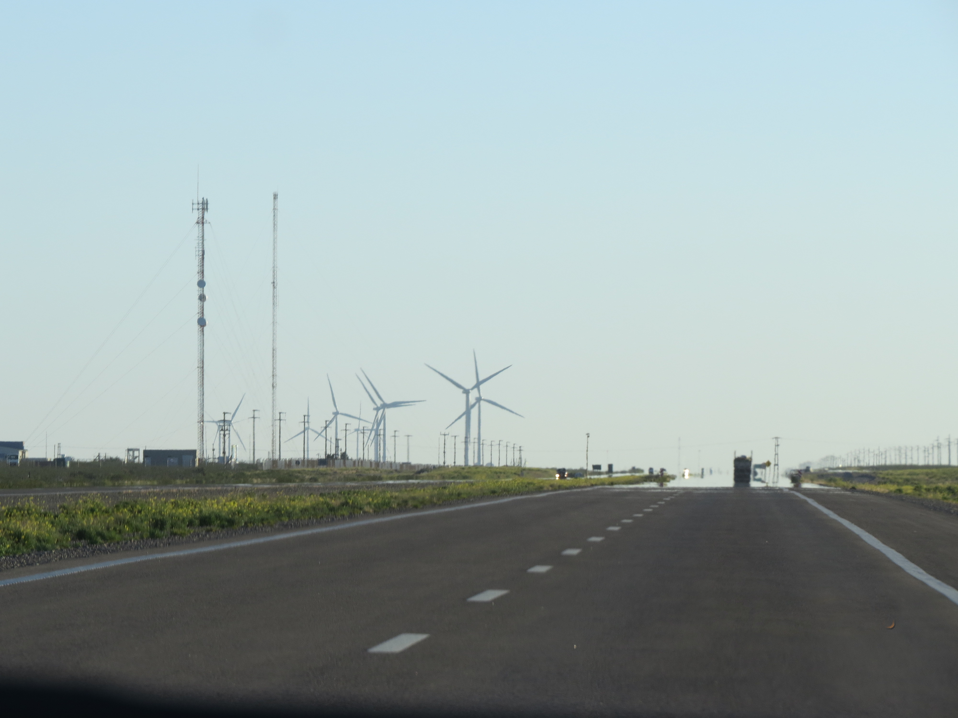 Vista del predio de la ex Torre Omega y al fondo el Parque Eólico Loma Blanca, en ruta 3, Trelew, Chubut